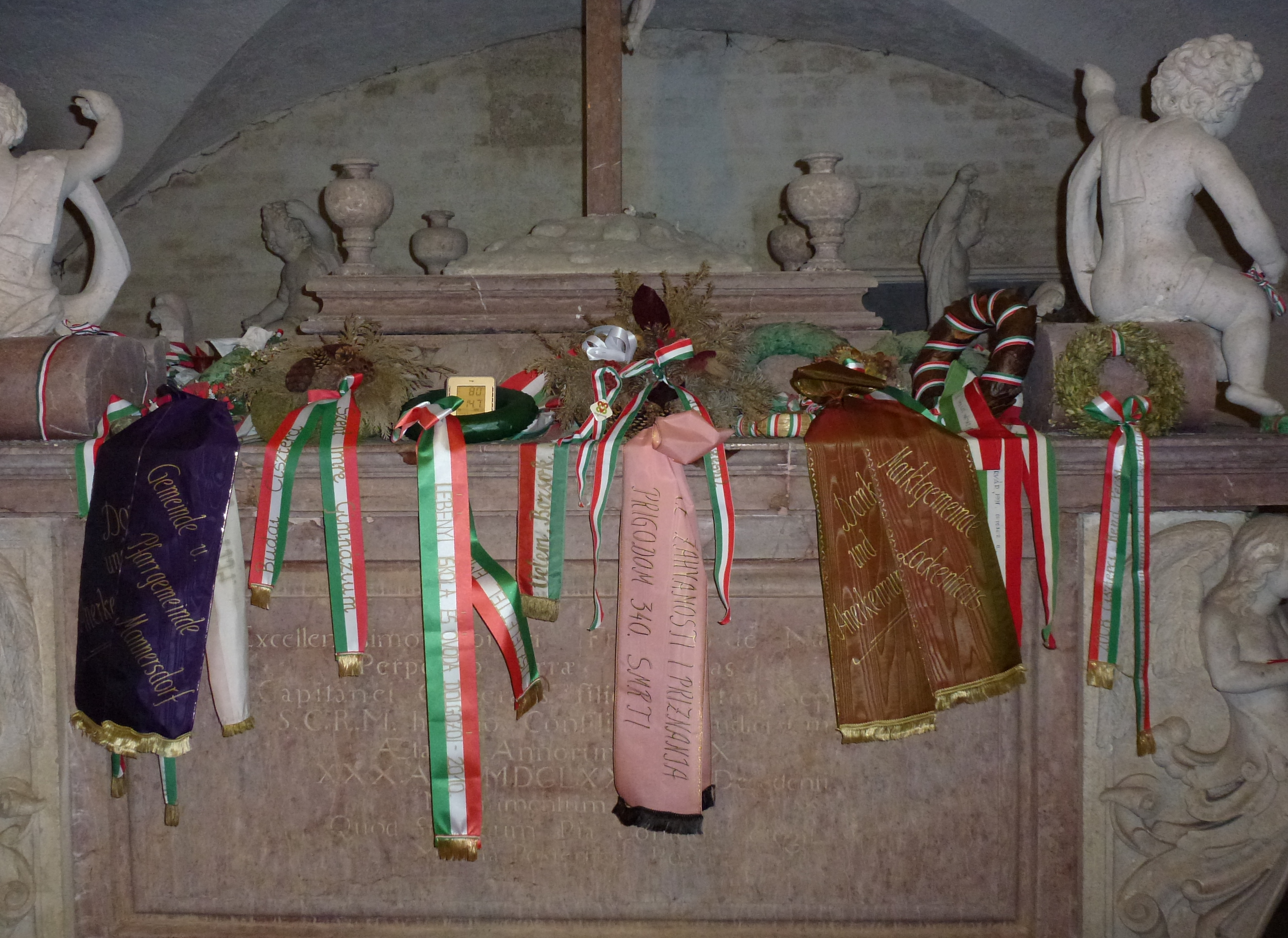 Wallfahrtskirche hl. Nikolaus in Lockenhaus, Grabmal in der Krypta